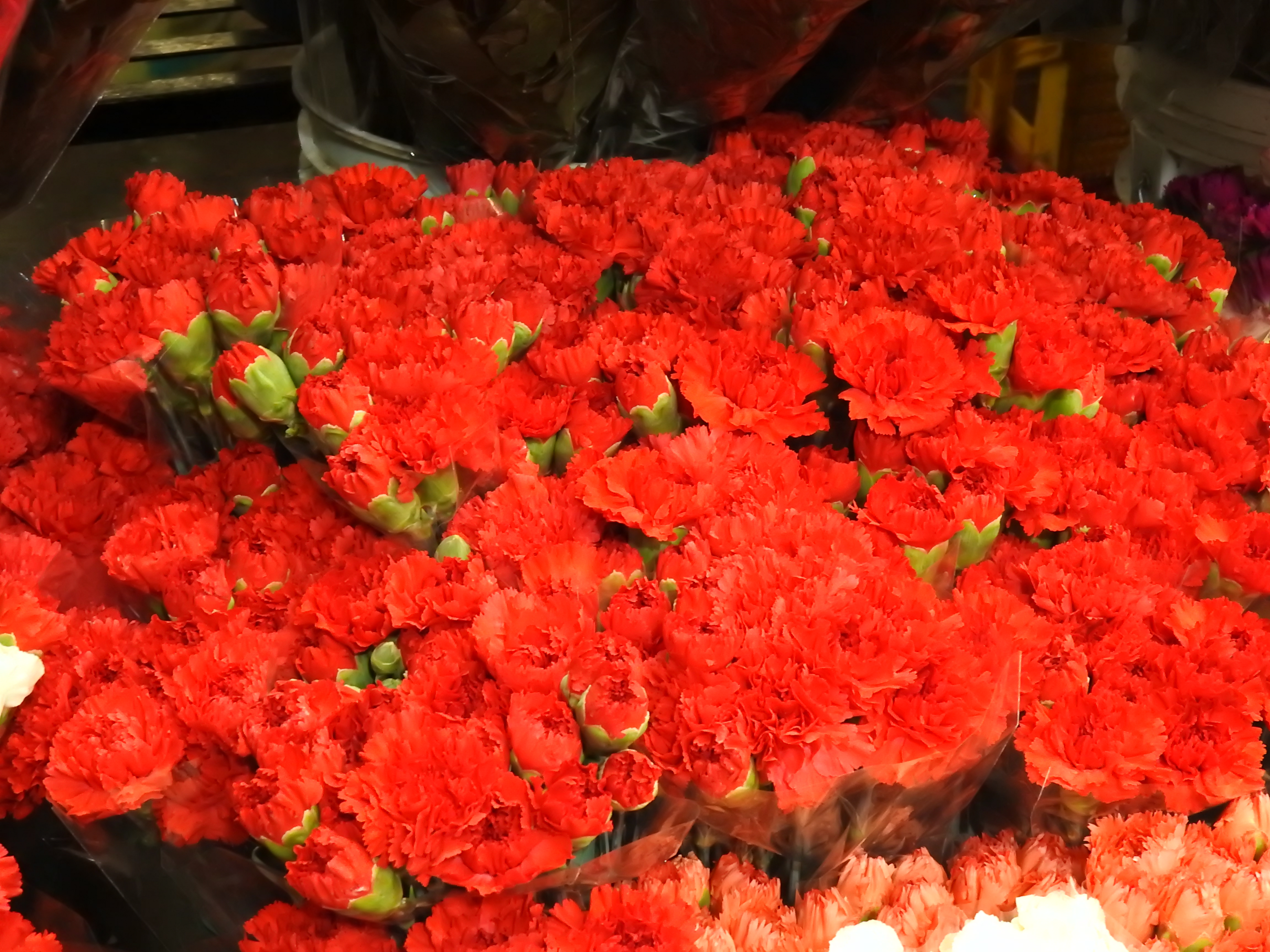 Flor encontrada en el mercado de Jamaica, cerca del centro de México; el clavel significa amor, orgullo y admiración.